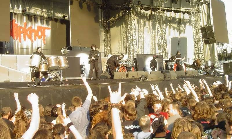 Photo prise lors d'un concert de Slipknot en 2005.